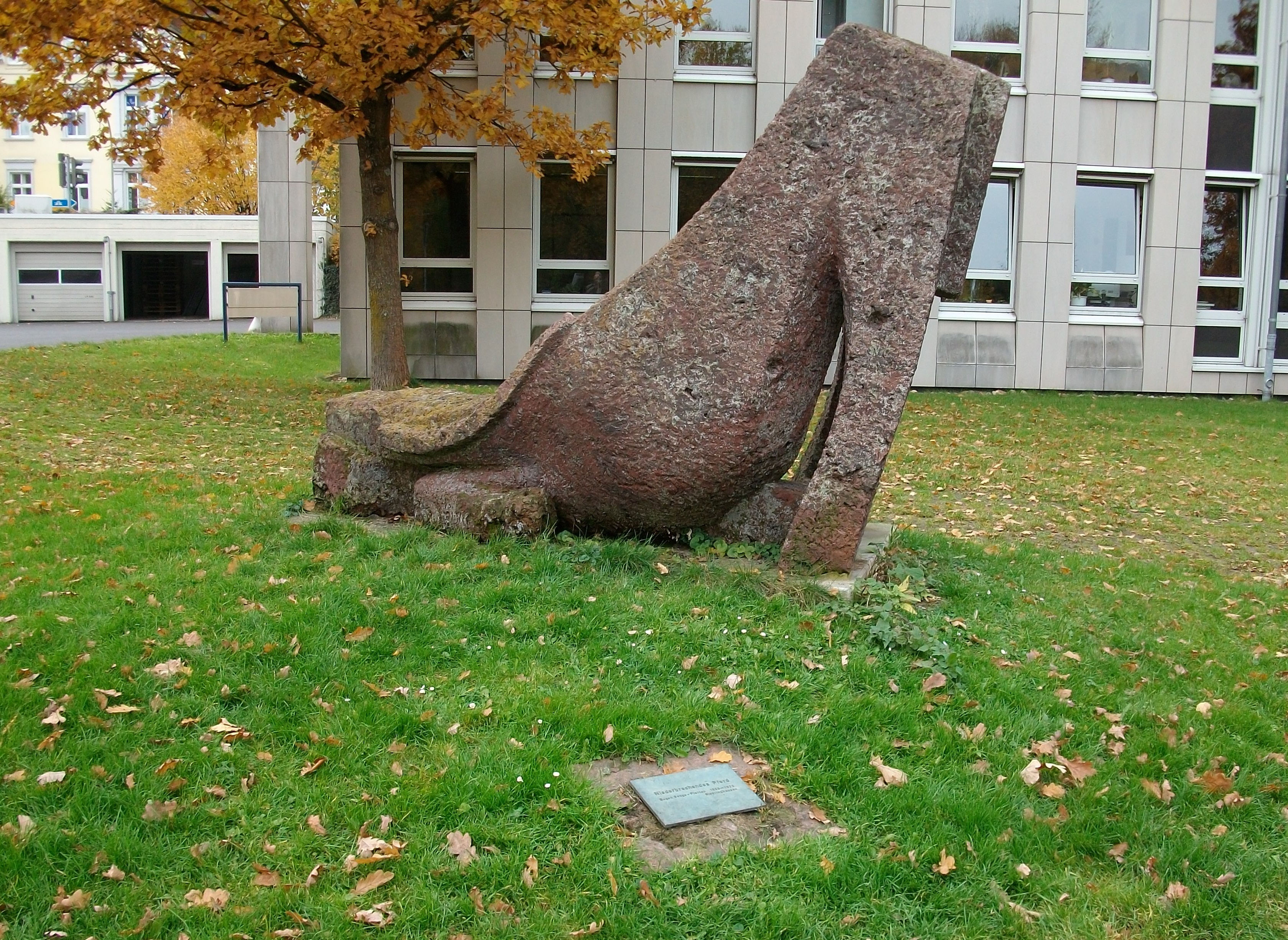 "Niederbrechendes Pferd" von Eugen Senge-Platten in Meschede vor dem Kreishaus (Germany)